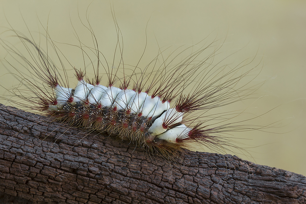 Local: Araçatuba/SP - Brasil Bioma: Mata Atlântica Acessórios: Tripé + Trilho Foco Macro + Cabo Disparador Remoto